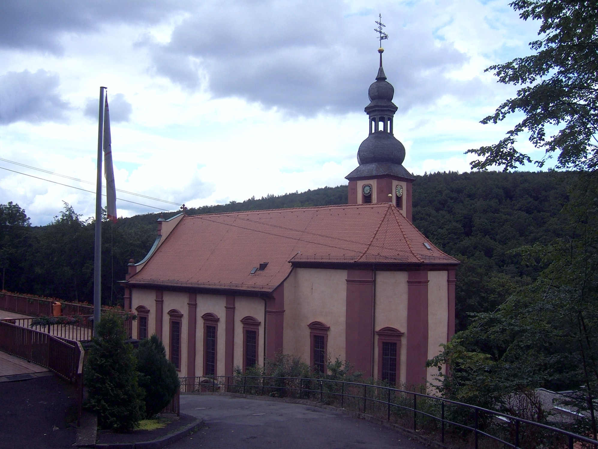 Klosterkirche Mariabuchen östlich von Lohr am Main.